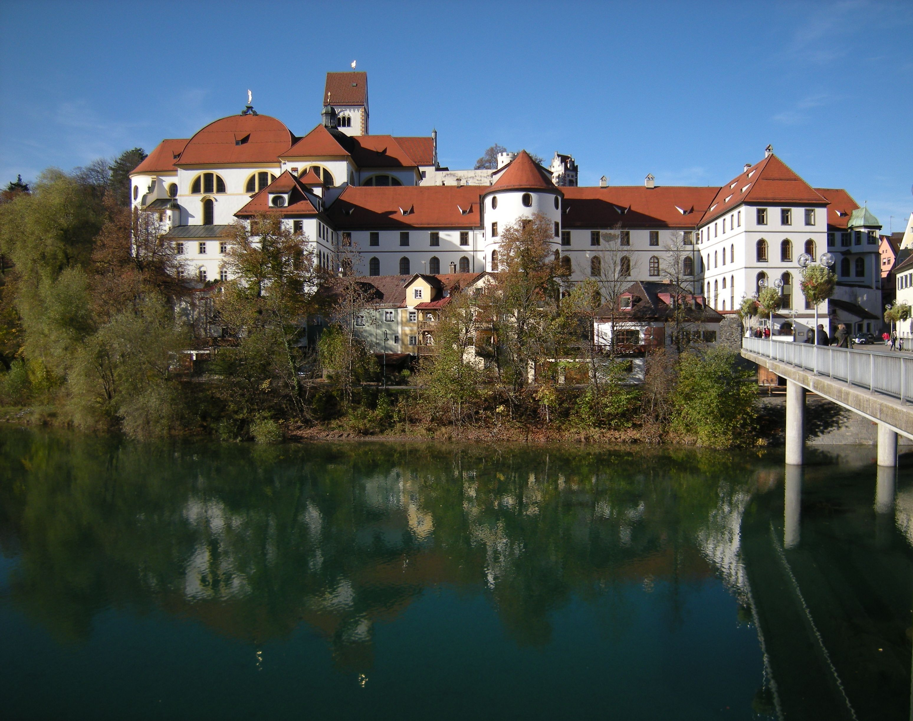 Füssen - Hohes Schloß und Kloster St. Mang über dem Lech.jpg